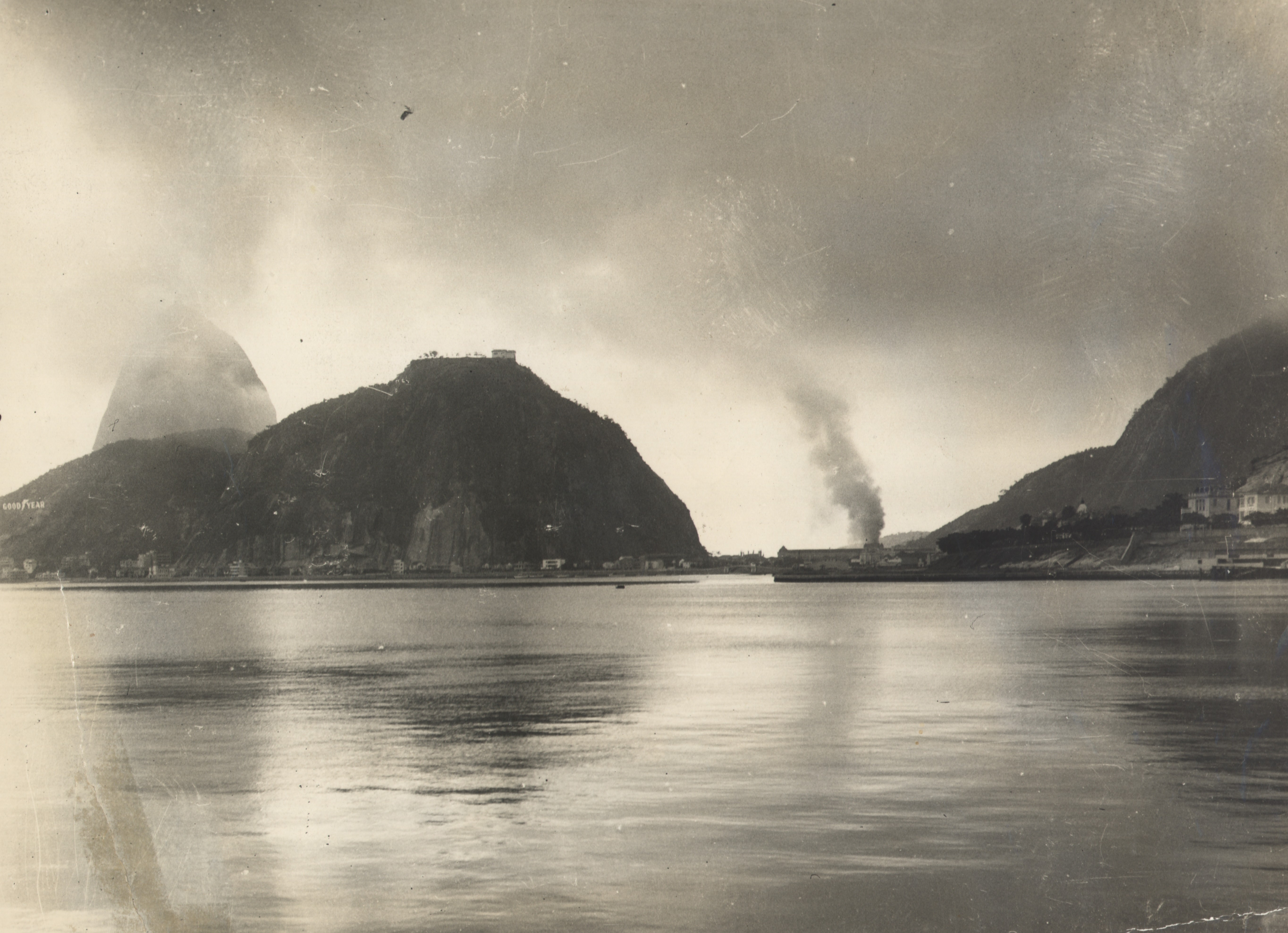 Imagem do Fundo Correio da Manhã.